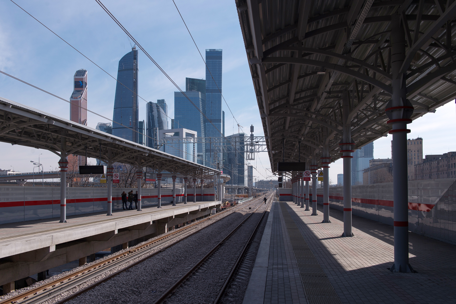 Платформа Шелепиха на МКМЖД